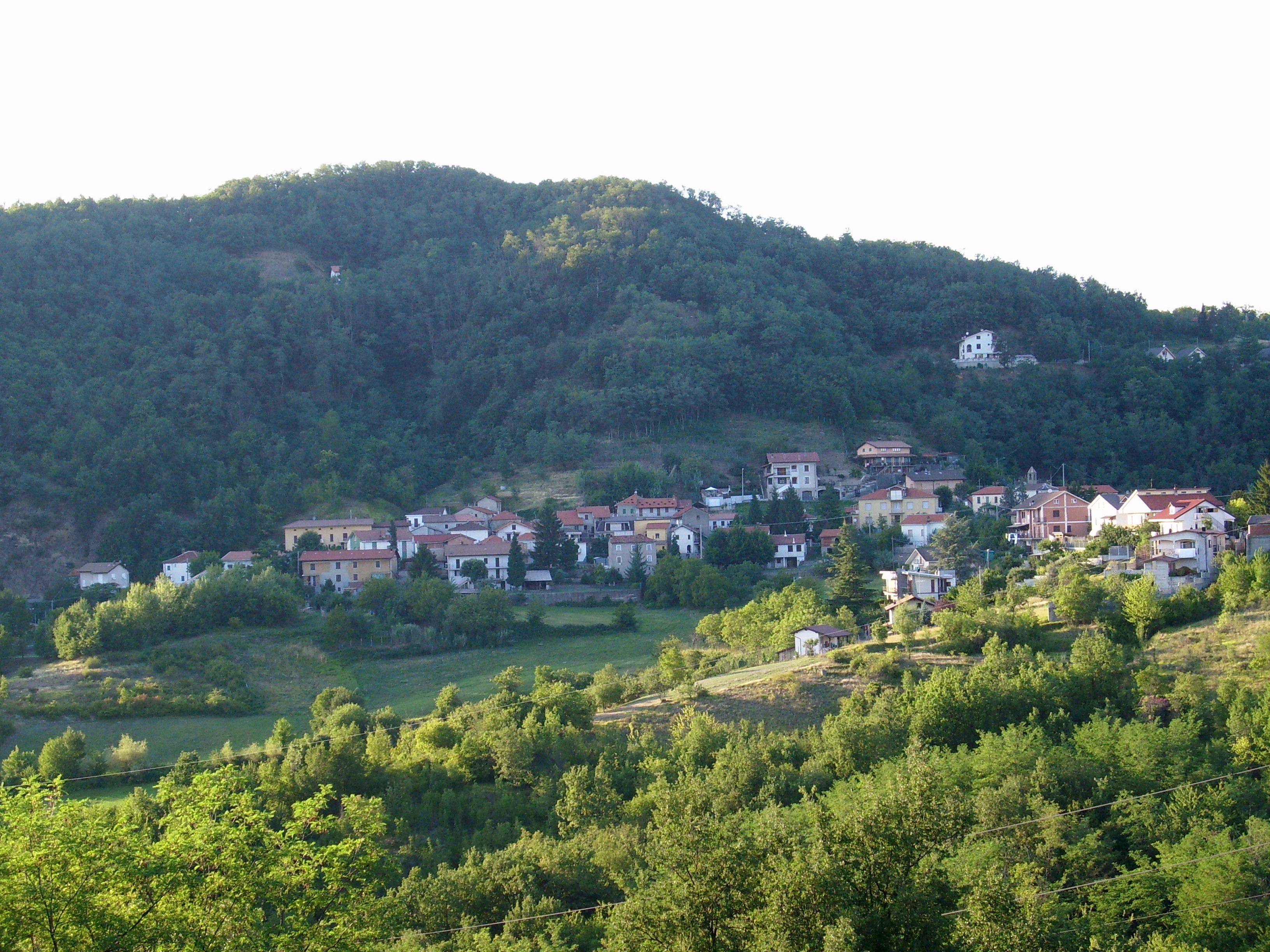 La frazione Vallosio (o Vallosi) di Morbello, fotografata dalla frazione Costa